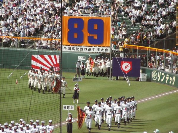 Saga kita-High School Hanshin Koshien Stadium 第89回全国高等学校野球選手権大会・開会式の佐賀県立佐賀北高等学校入場行進の様子